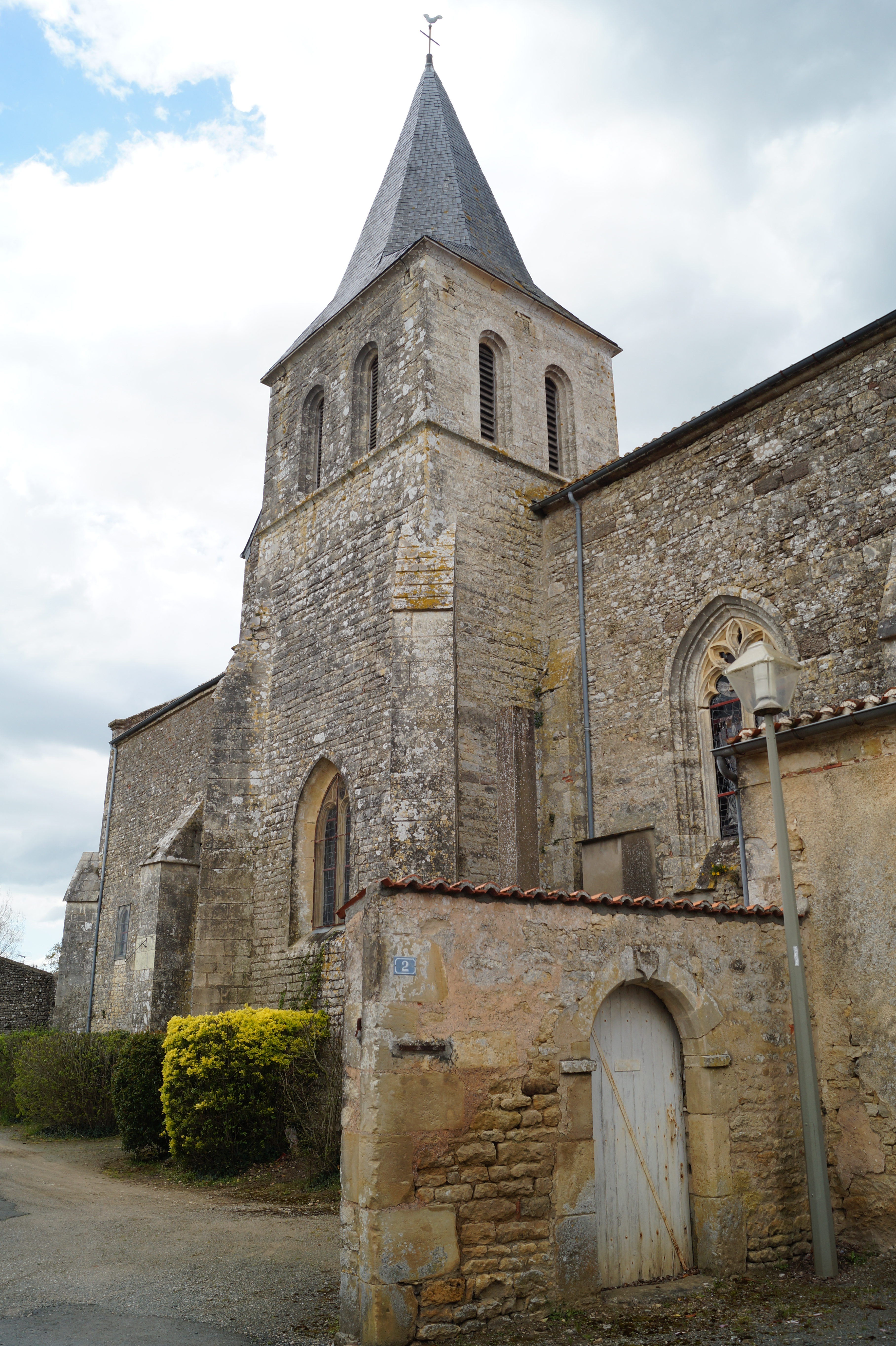 L’église Saint-Sulpice de Saint-Sulpice-en-Pareds depuis la rue de l’Abbé-Gaillard.